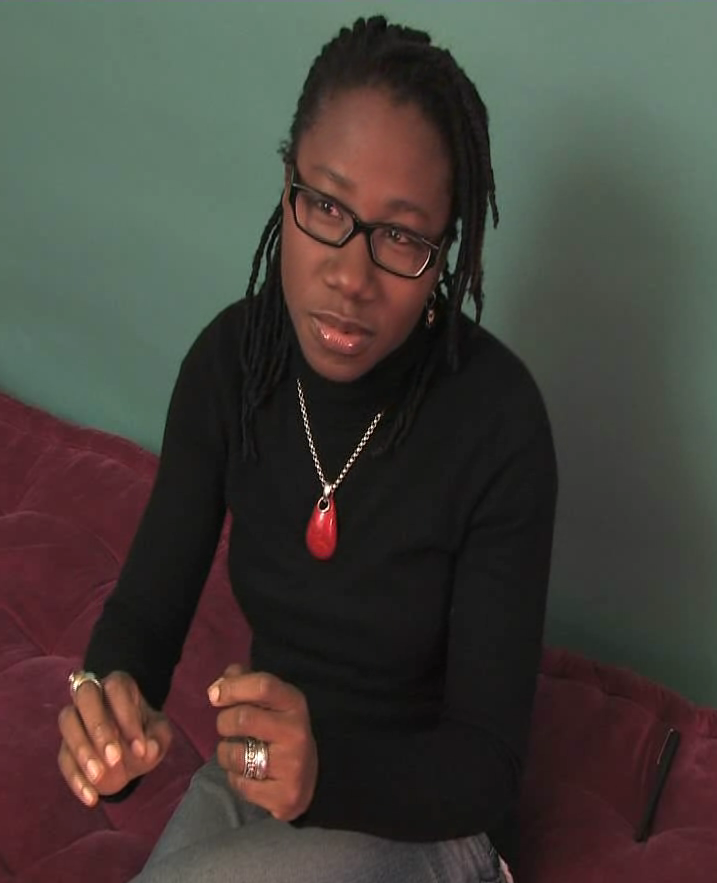 Nigerian singer Aṣa